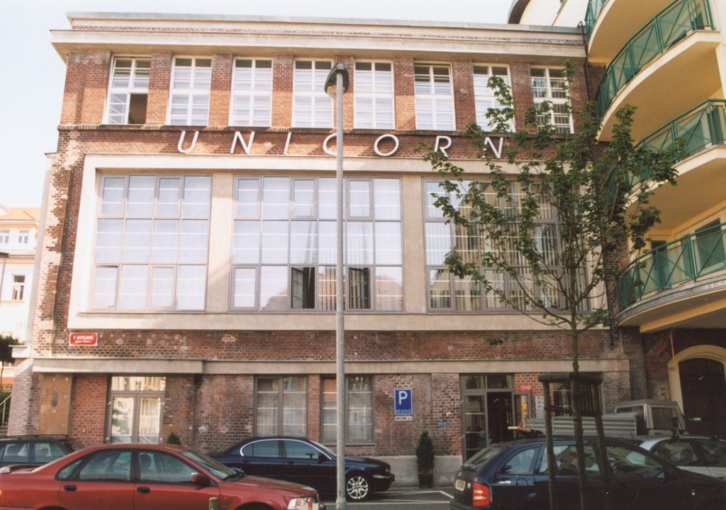 Sídlo Unicorn College, Praha-Žižkov, V kapslovně 2767/2.